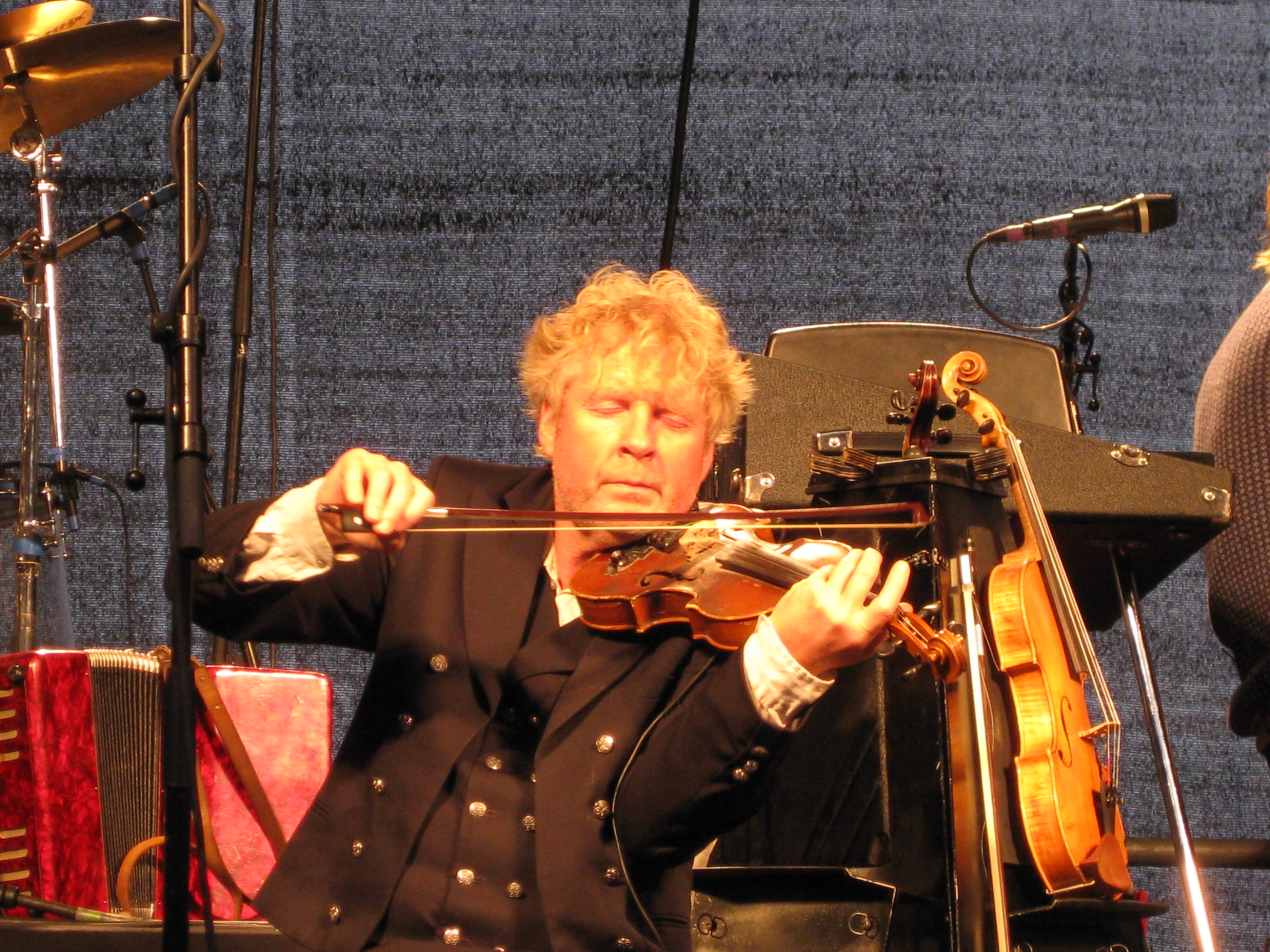 Øyvind Staveland under en konsert på Lindesnes